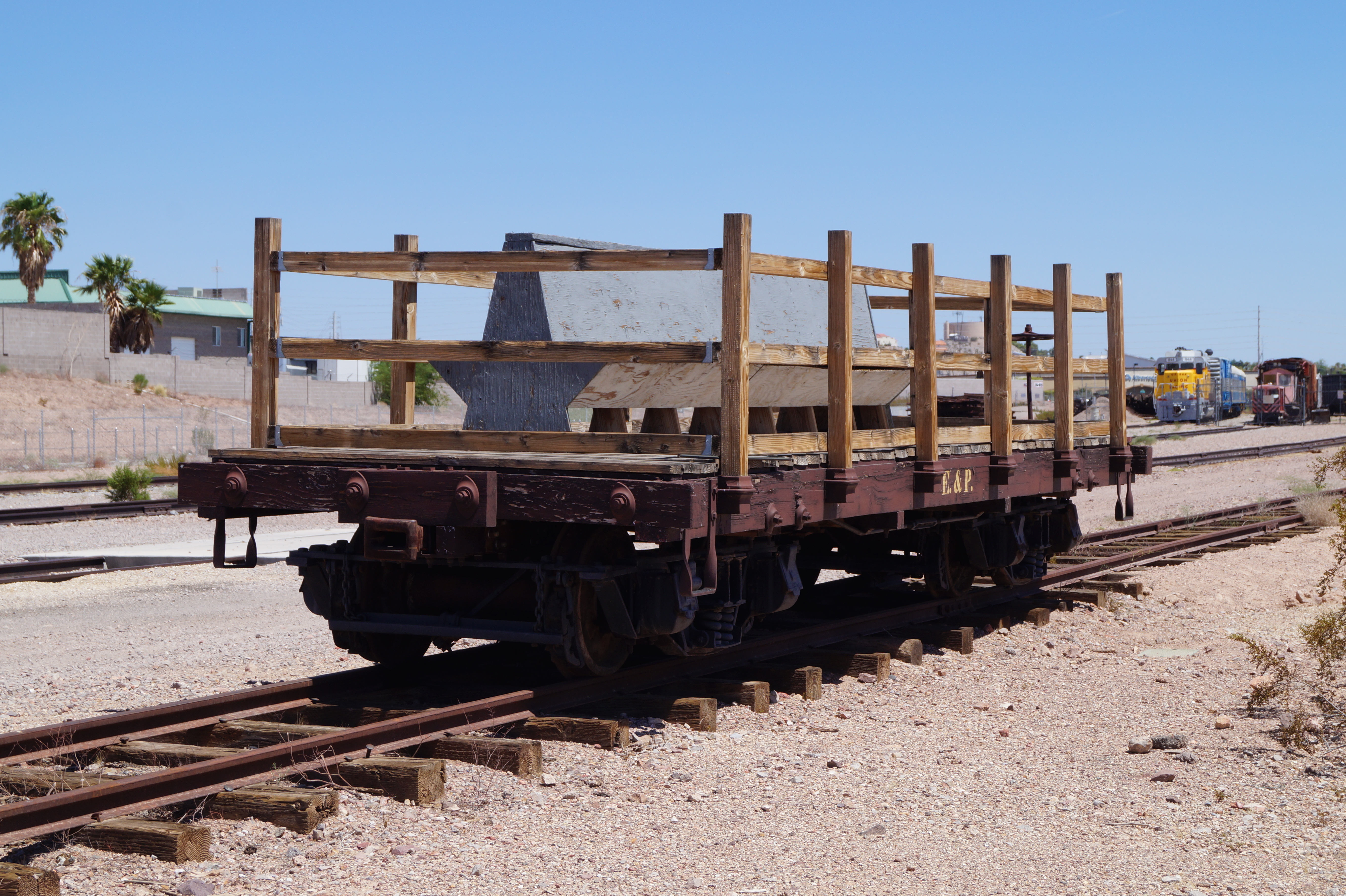 The Nevada State Railroad Museum which is an agency of the Nevada Department of Cultural Affairs. It is located at Yucca Street on the tracks of the historic Union Pacific Railroad branch Henderson-Boulder City near the former Boulder City Railroad Yards where the Hoover Dam construction equipment was unloaded in the 1930s.